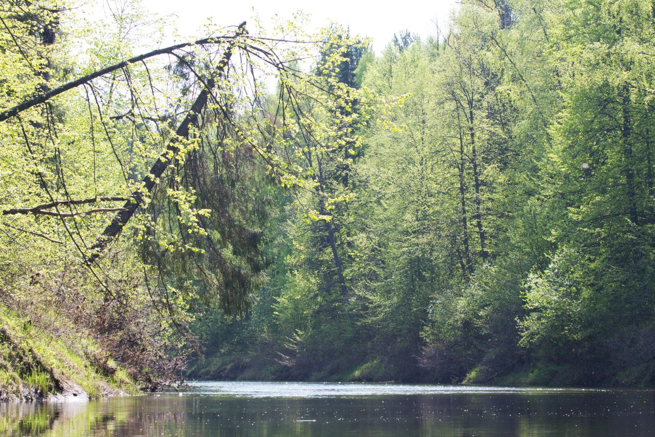 Пижемский заказник: от районного центра г. Шахунья на северо-восток в 24 км, от р. п. Вахтан на восток в 11 км,Тоншаевский район, Нижегородская область This image is related to the protected area of Russia number 5210571